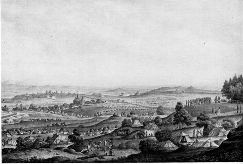 Prise de Mayence die Belagerung von Mainz 1792 hat der Weimarer Maler Georg Melchior Kraus in einem Kolorierten Stich der Nachwelt überliefert. Le siège de Mayence par les Français en 1792